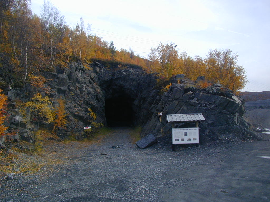 Bjørnevatntunnelen, Her berga 3000-4000 menneske frå Kirkenes seg unna då slaget stod om Kirkenes hausten 1944.